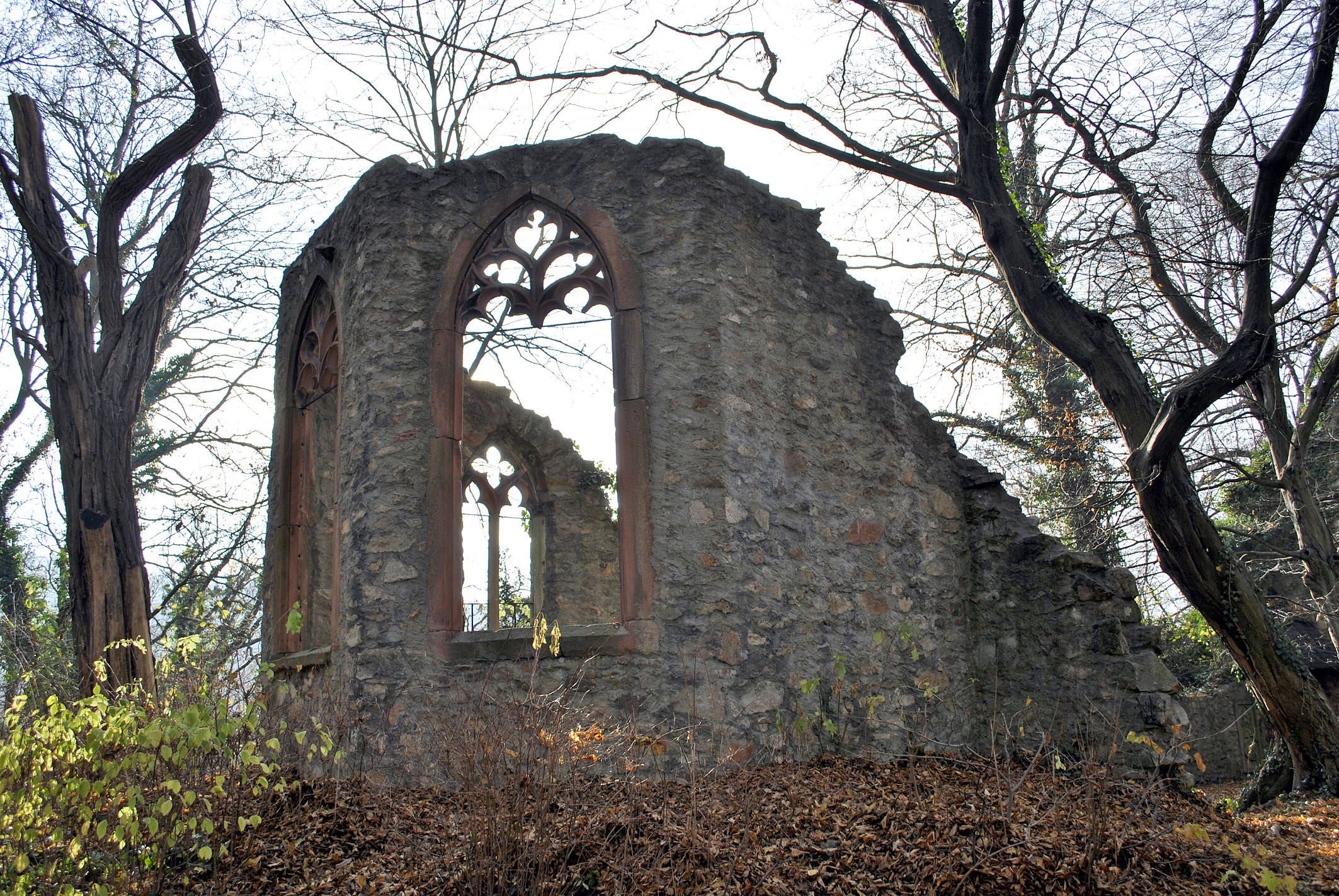 Malerische Ruine auf dem Heiligenberg über Jugenheim (Hessen)